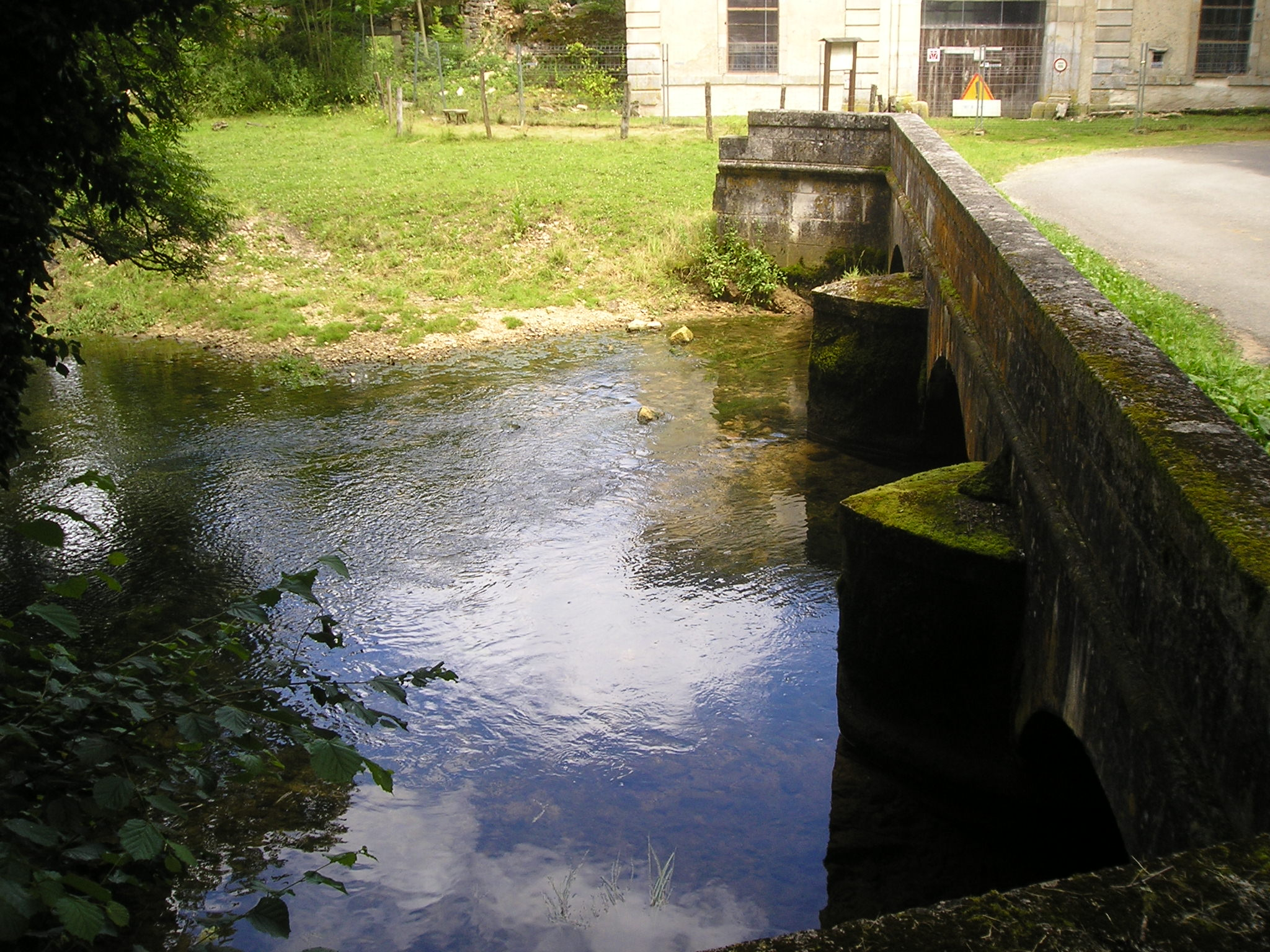 pont sur le Rognon, devant la porterie de l'abbaye de la Crête. (Haute-Marne, France)